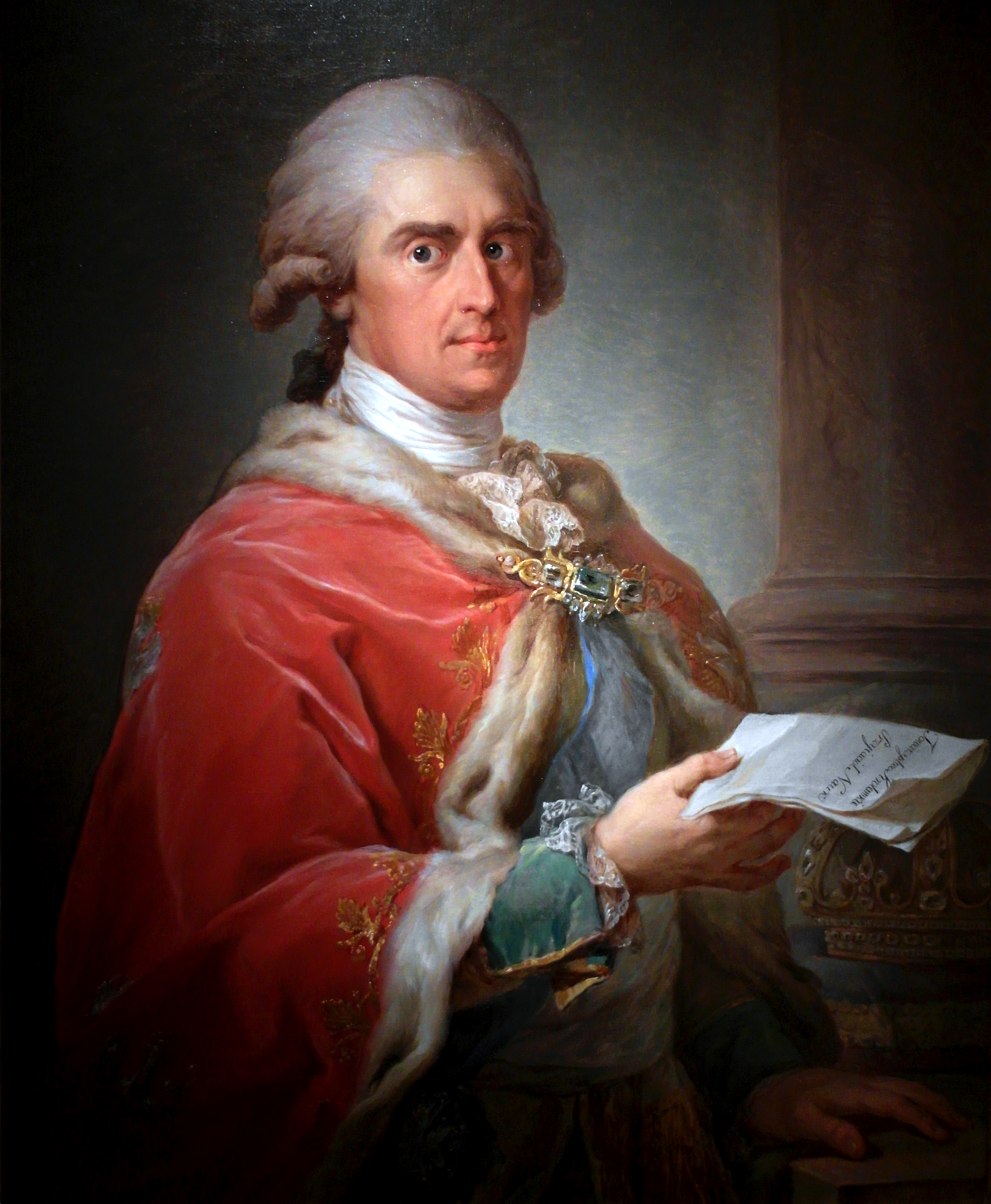 Fryderyk August (1750-1827)